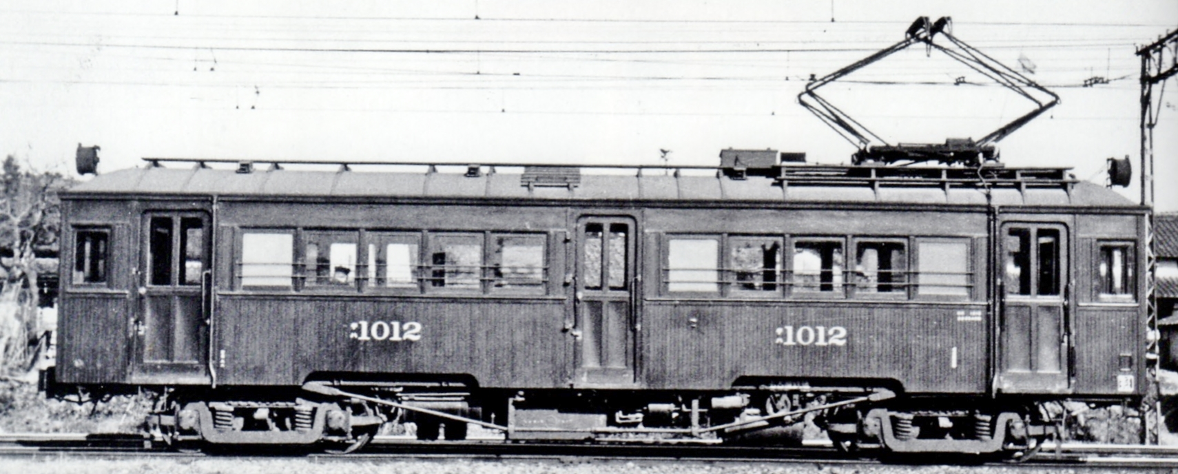 デハ1010形（旧デ100形）。遅くとも電装解除されサ1010となる1943年以前。